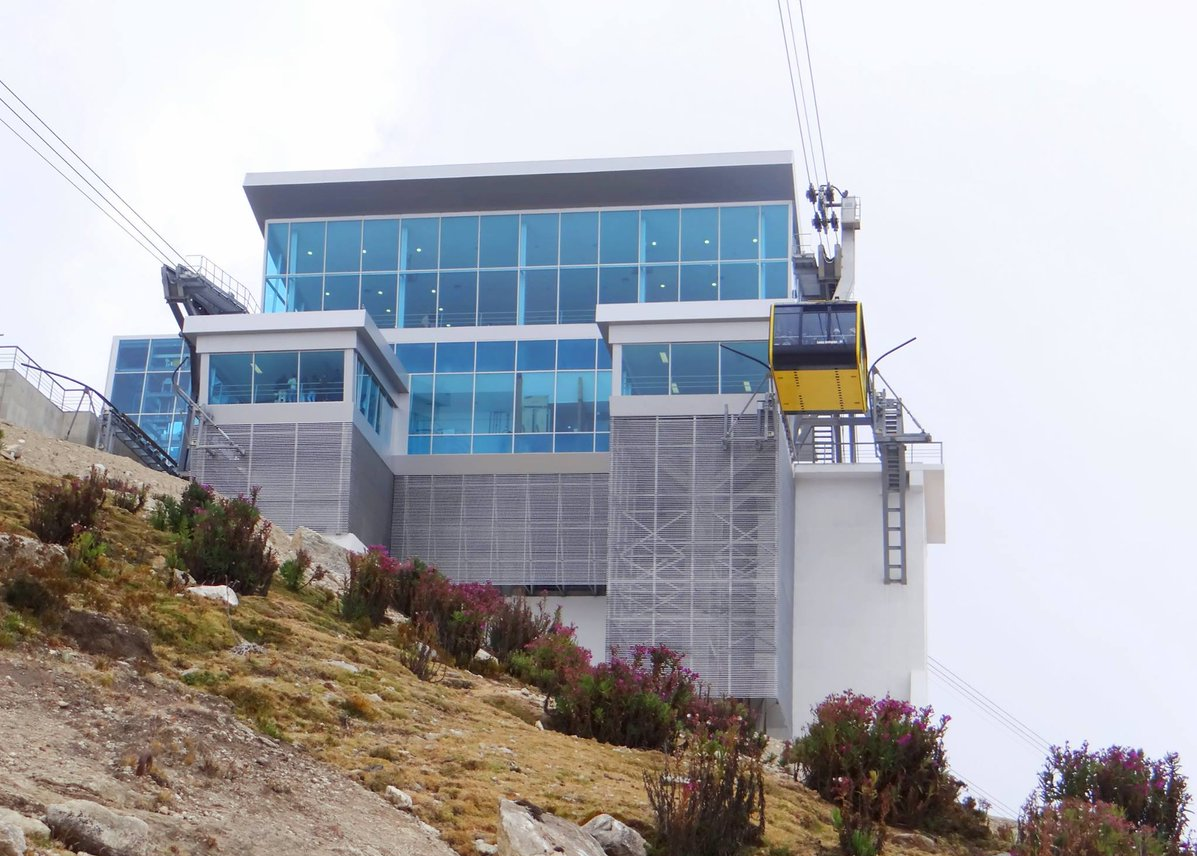 Teleférico de Mérida (Mukumbari), Parque nacional Sierra Nevada (Venezuela), Andes venezolanos, en febrero de 2017 10